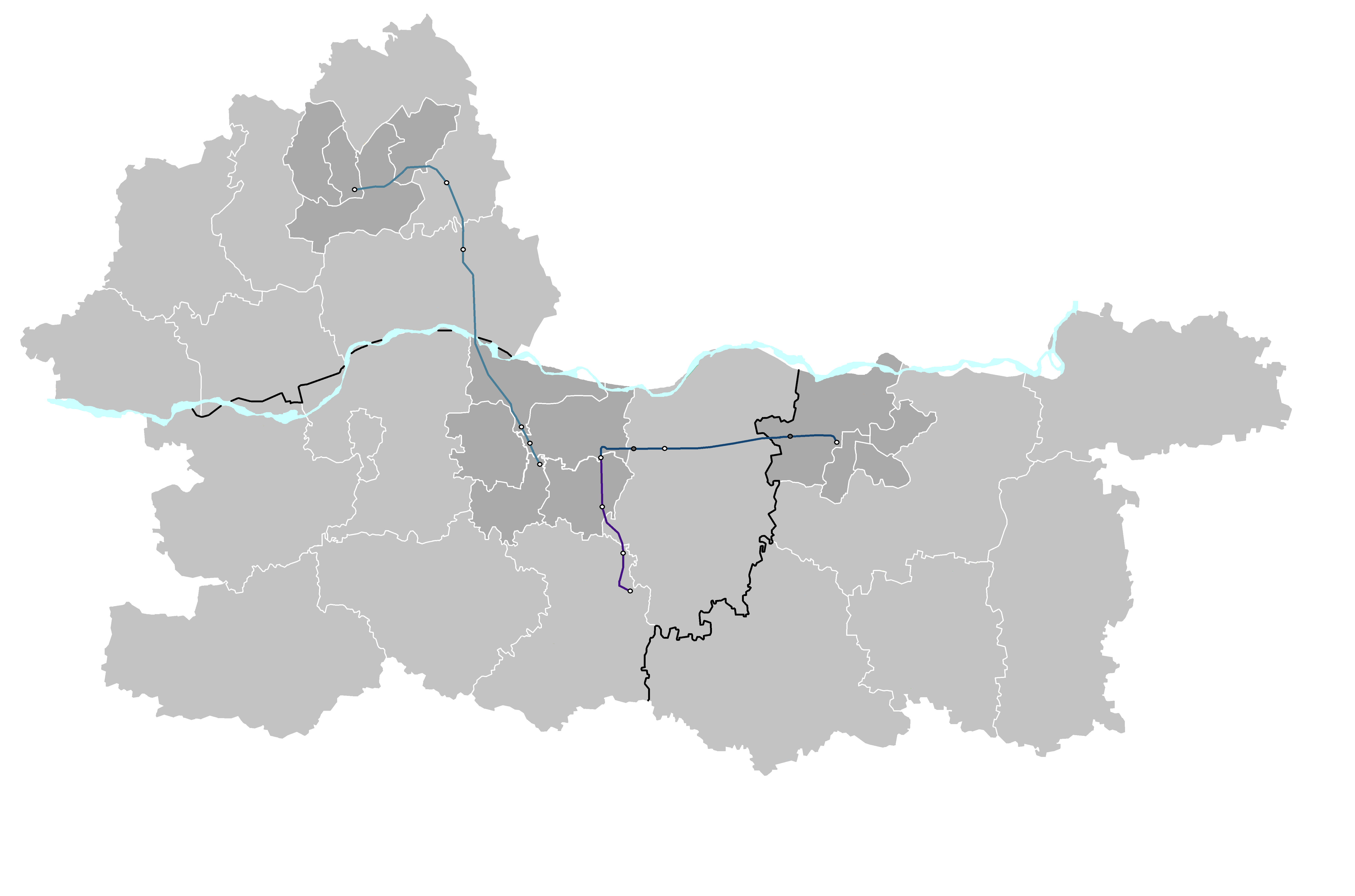 نقشه خطوط ریلی بین شهری شبکه ریلی کلانشهر دشت مرکزی چین